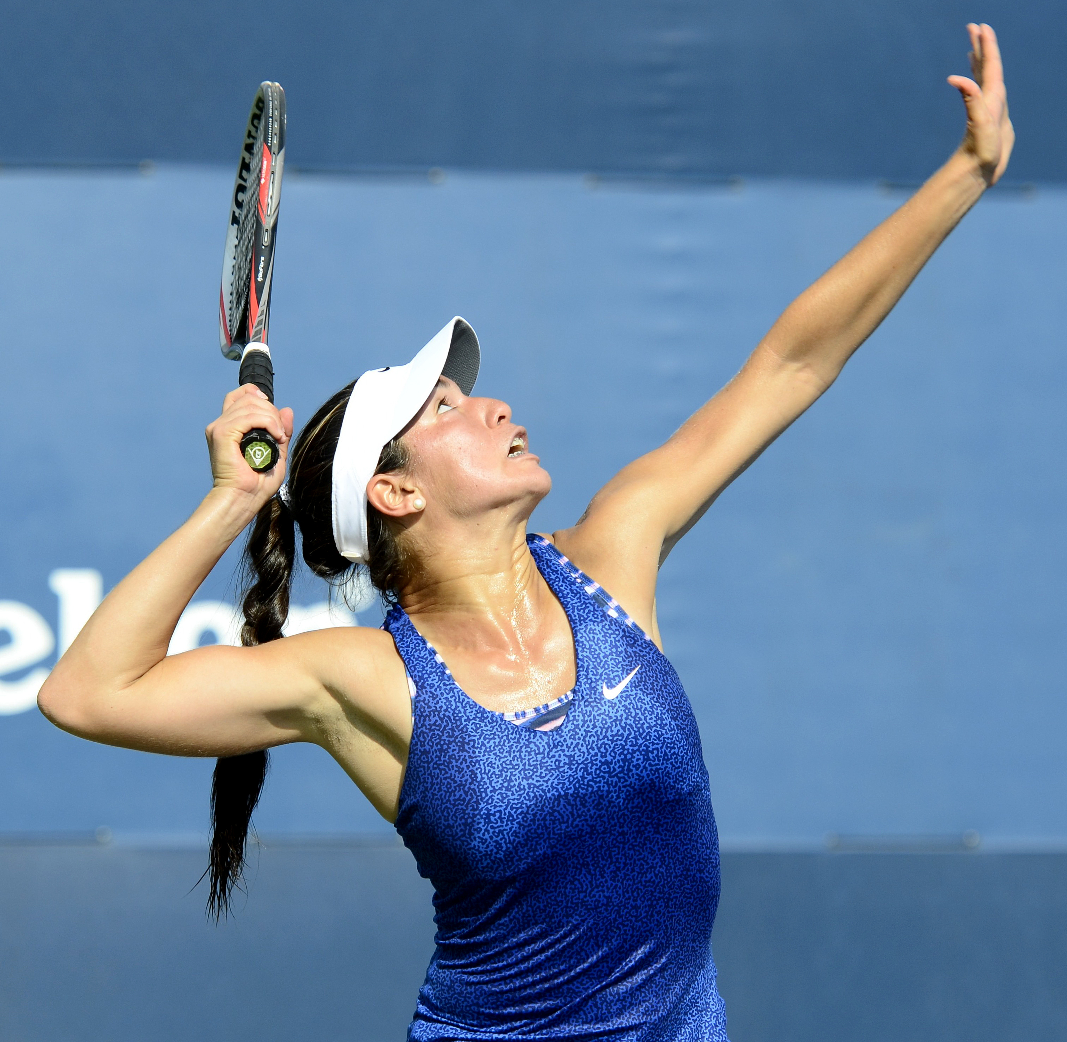 August 19, 2013 Queens, NY Yulia Putintseva (KAZ) def. Montserrat Gonzalez (PAR)